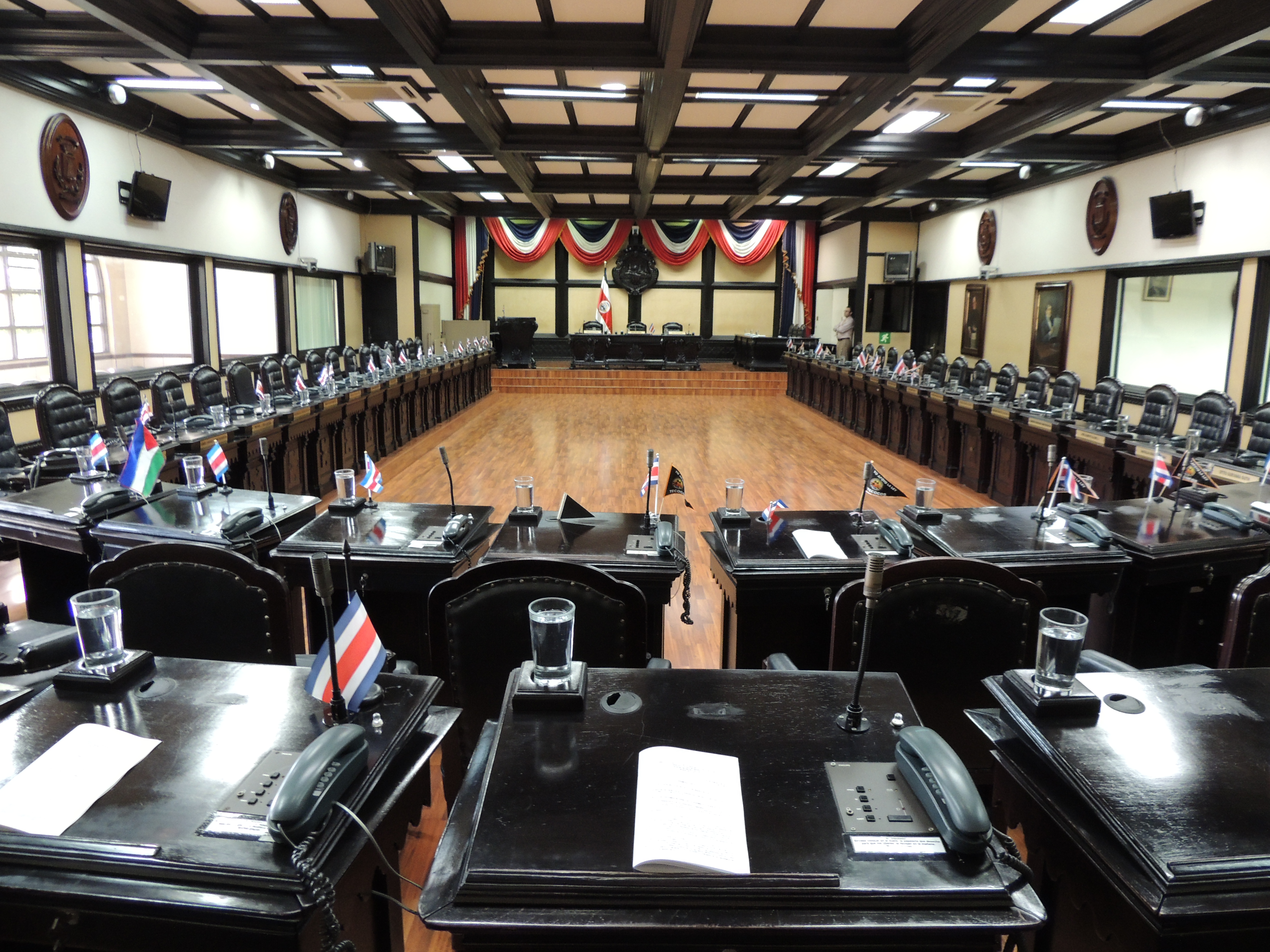 Lugar donde sesionan los diputados de la Asamblea Legislativa de Costa Rica